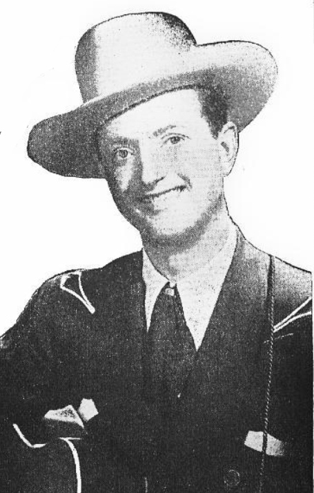 Al Dexter